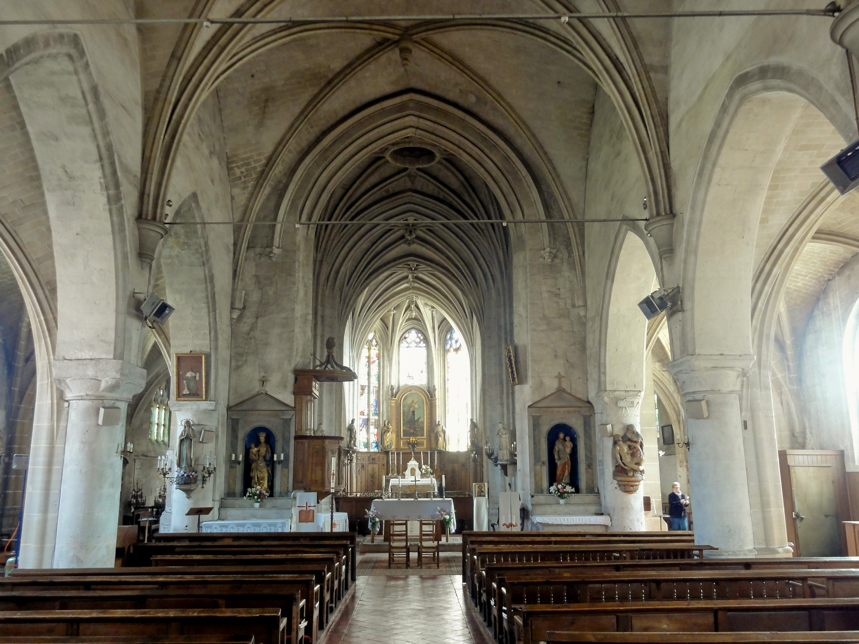 Vue générale intérieure depuis le portail occidental.